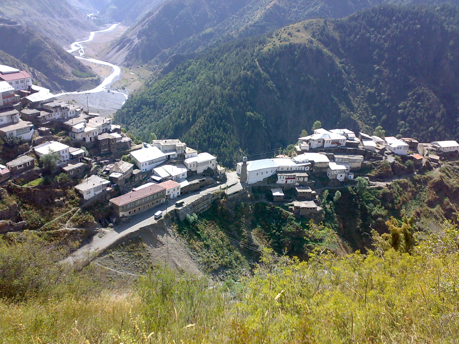 село Цахур Верхний квартал